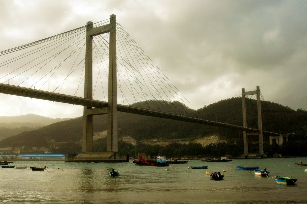 Ria de Vigo. Galicia. Spain